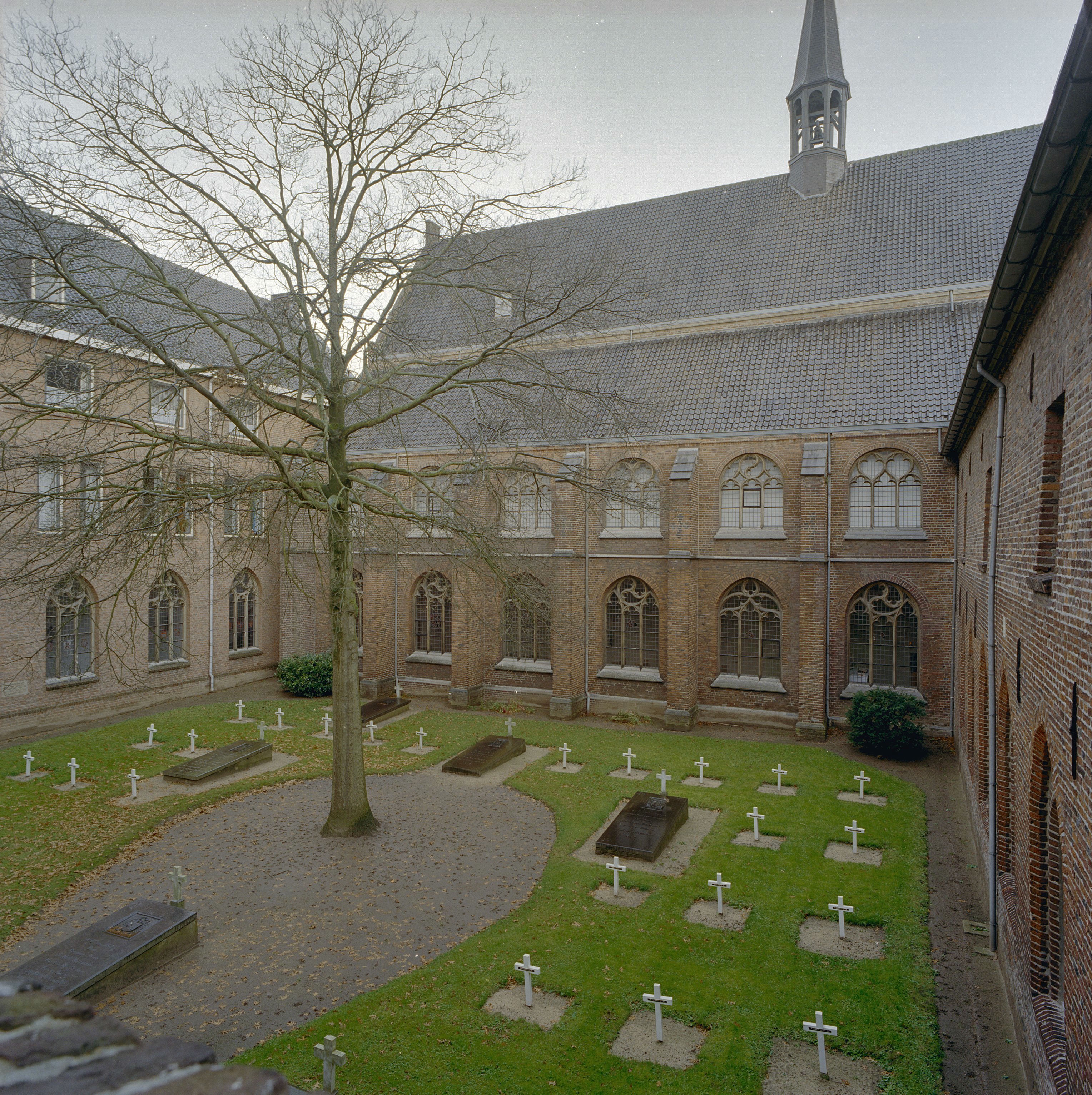 Kruisherenklooster: Overzicht binnenhof, begraafplaats